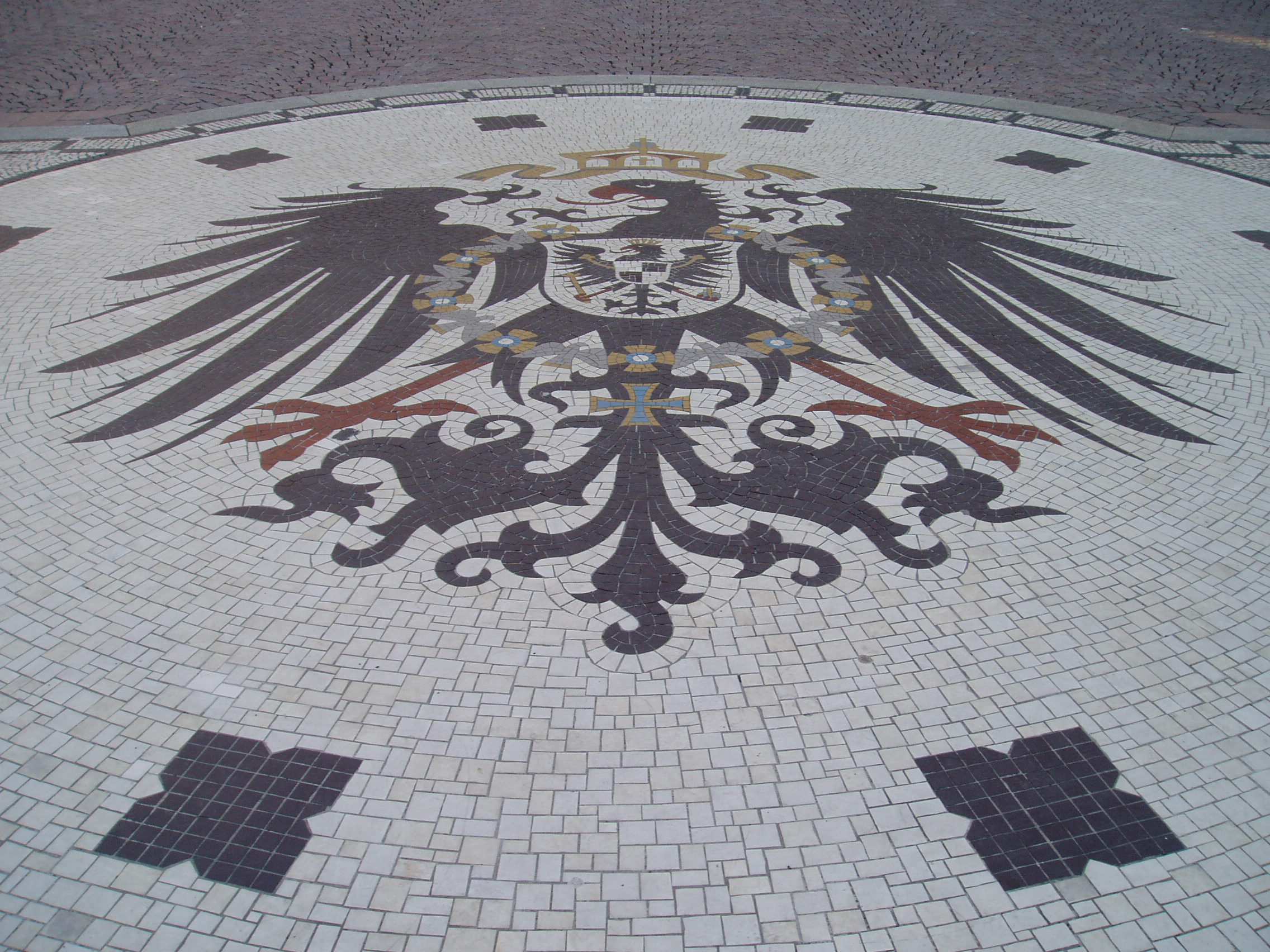 Das Bild zeigt ein Teil des Mosaiks auf dem Schloßplatz in Wiesbaden vor dem Neuen Rathaus. Es stellt den kaiserlichen Reichsadler dar.